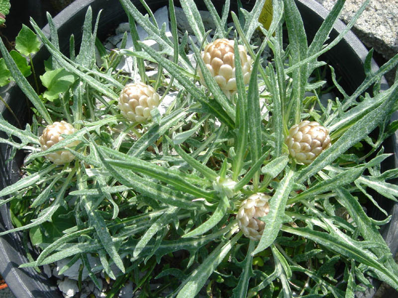 Leuzea conifera